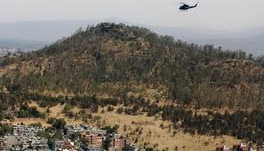 Vista Cero de la Estrella